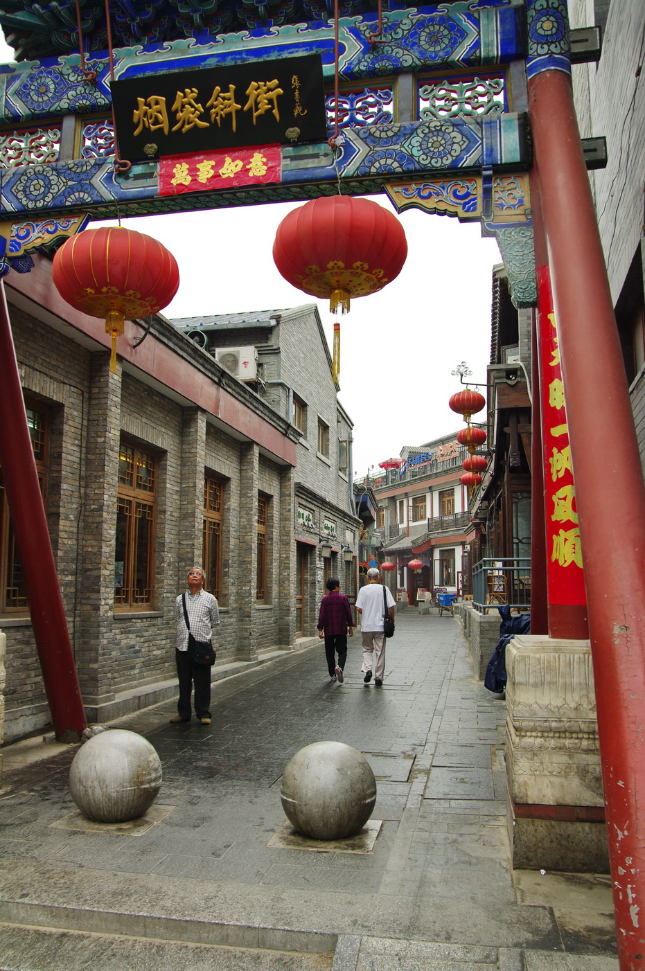 Hutong in der Nähe des Trommelturms, Peking